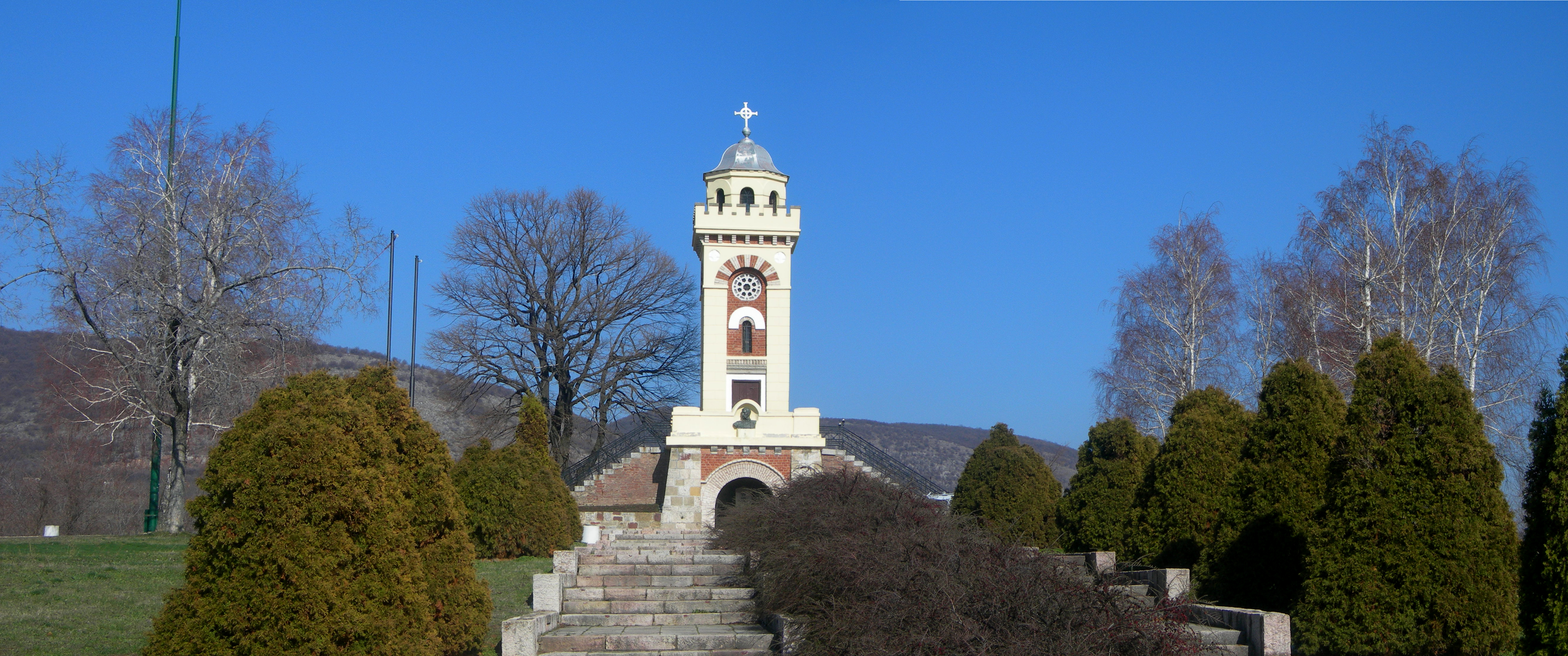 Spomenik na Čegru